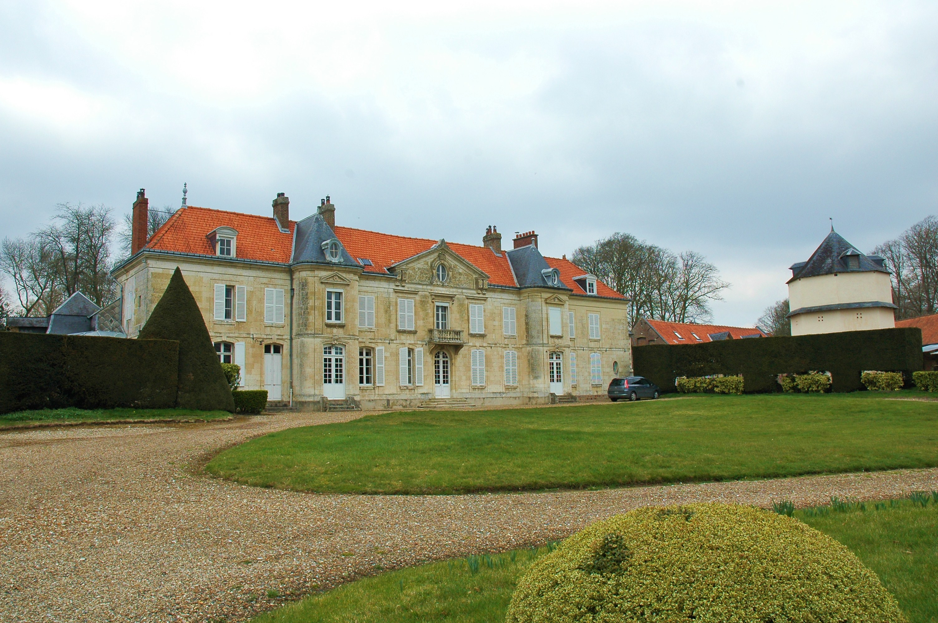 Le Chateau, Belloy-sur-Somme, Somme, France